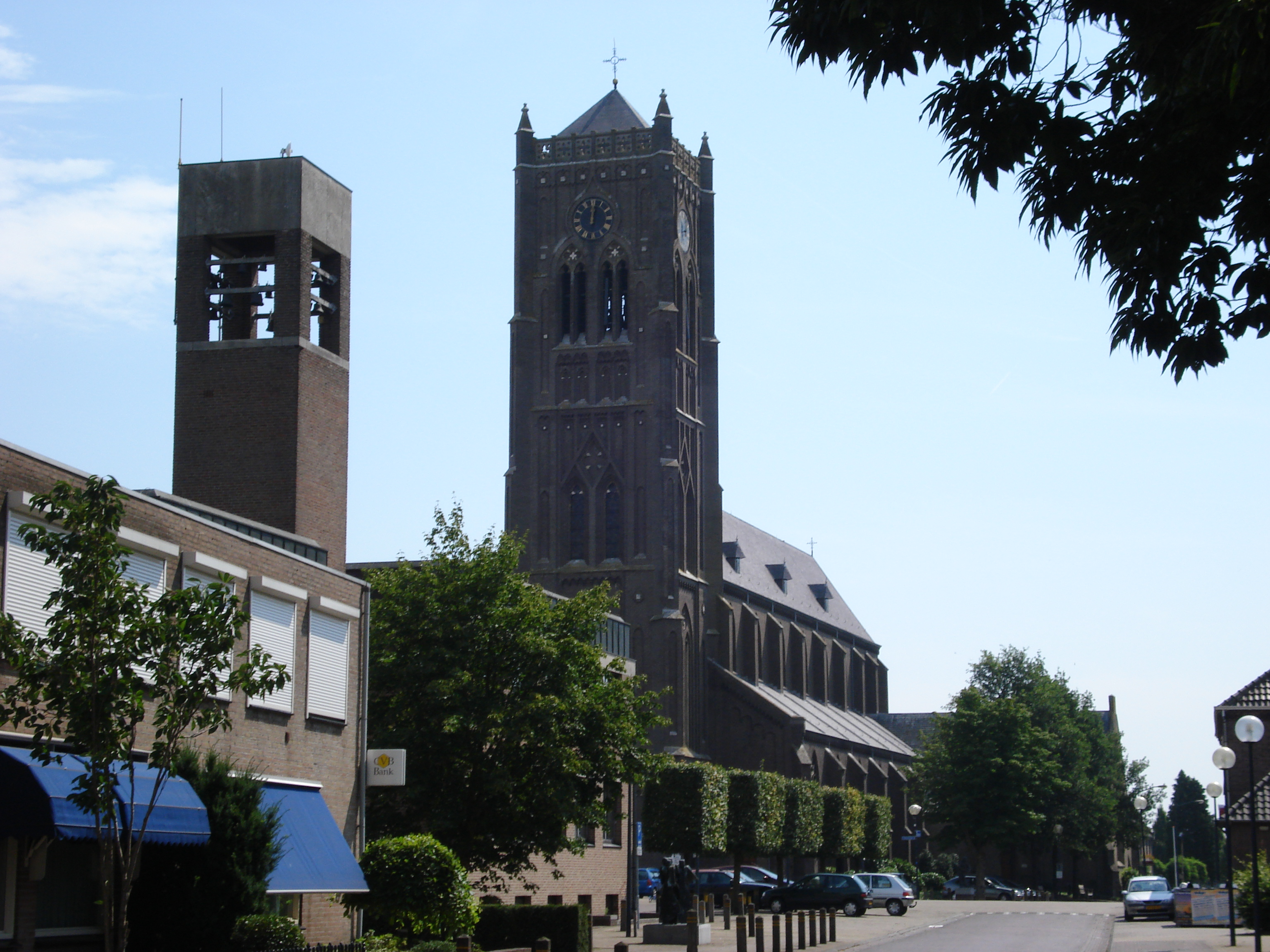 Mairie de la commune de 'Mill en Sint Hubert' à coté de l'église de Mill, chef-lieu de la commune. province de Brabant, NL. L'église est Rijksmonument